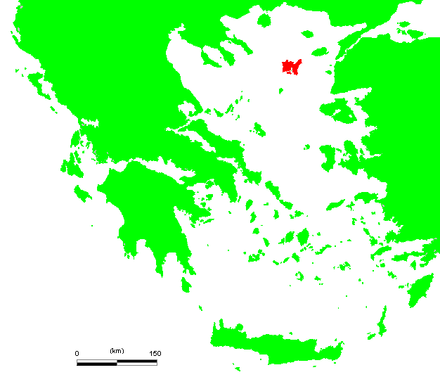 GR Lemnos.PNG (Greek island)